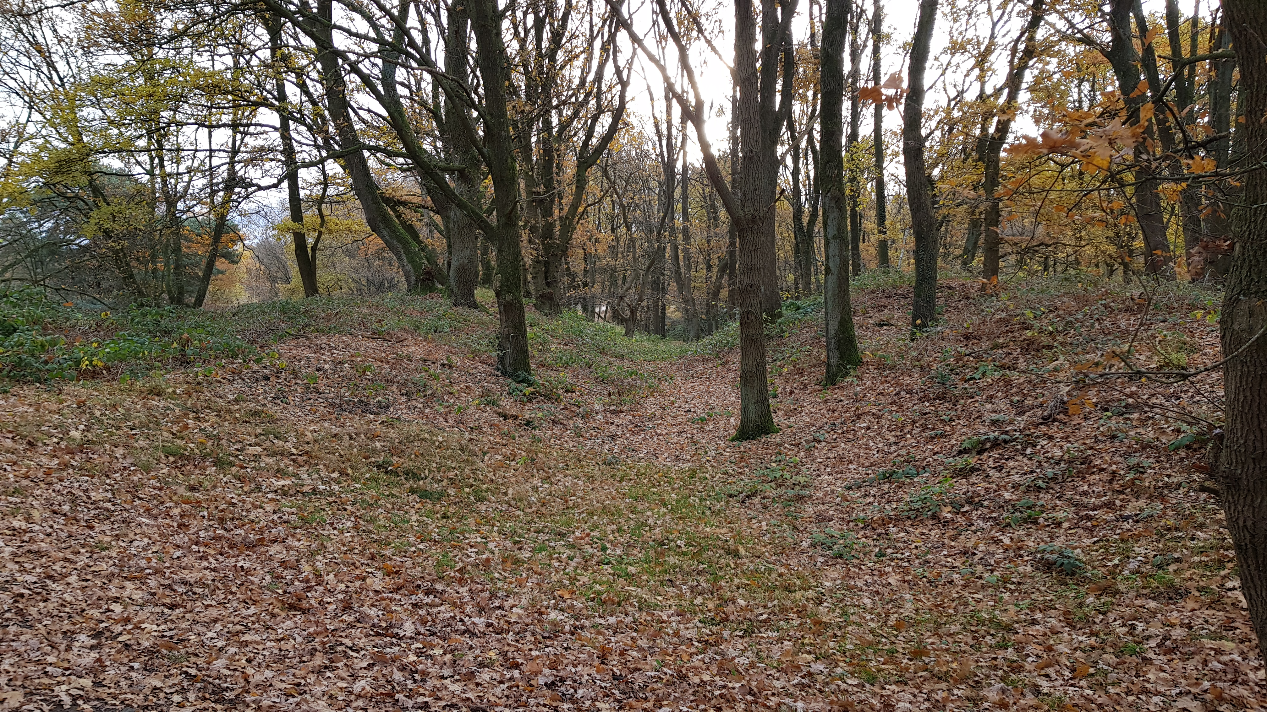 Landgraaf Brunssummerheide, Heerlen, Nederland